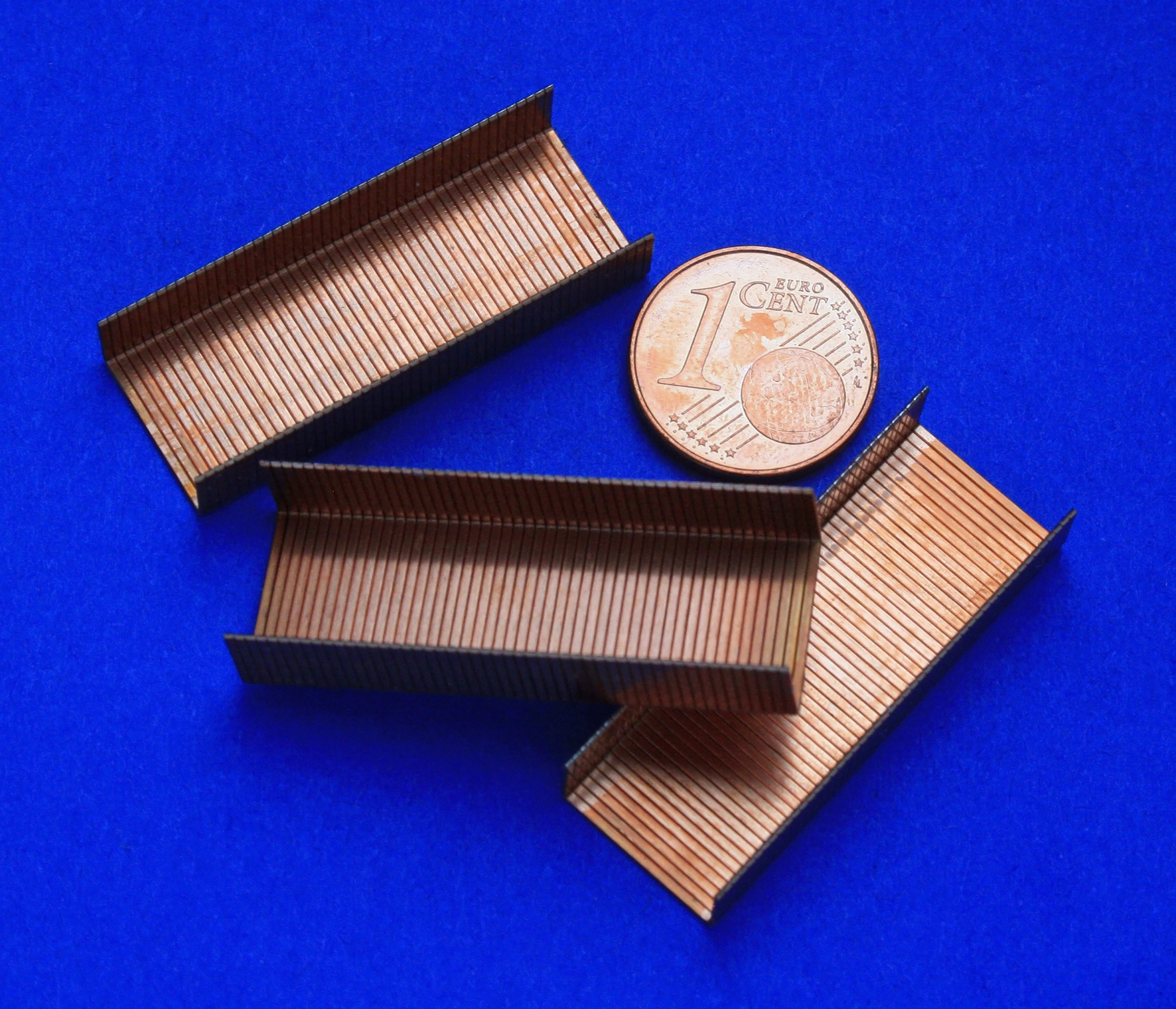 Drei verkupferte Klammerstäbe des Herstellers SAX (24/6). Zum Größenvergleich ist eine 1 Cent Münze beigelegt This image has currency in it to indicate scale. Using coins for scale is discouraged as it will require people unfamiliar with them to look up the dimensions or guess, both of which defeat the purpose of the object in the first place. Coins can also reinforce a geographical bias, and some coins' designs are copyrighted. Ideally, a photograph should include a ruler with the subject (example) or an added scale marking. SI ("metric") units are the most commonly used worldwide (see meter and centimeter). Images with coins to indicate scale Common coin diameters for reference: U.S. dollar: 1¢: 19.05 mm , 0.75 in 5¢: 21.21 mm , 0.84 in 10¢: 17.91 mm , 0.71 in 25¢: 24.26 mm , 0.94 in 50¢: 30.61 mm , 1.22 in $1: 26.5 mm , 1.02 in Canadian dollar: 1¢: 19.05 mm , 0.75 in 5¢: 21.2 mm , 0.83 in 10¢: 18.03 mm , 0.71 in 25¢: 23.88 mm , 0.94 in 50¢: 27.13 mm , 1.07 in $1: 26.5 mm , 1.02 in $2: 28 mm , 1.1 in Pound sterling: 1p: 20.32 mm , 0.8 in 2p: 25.91 mm , 1.02 in 5p: 18 mm , 0.71 in 10p: 24.5 mm , 0.96 in 20p: 21.4 mm , 0.84 in 50p: 27.3 mm , 1.07 in £1: 22.5 mm , 0.89 in £2: 28.4 mm , 1.12 in Euro: 1c: 16.25 mm , 0.64 in 2c: 18.75 mm , 0.74 in 5c: 21.25 mm , 0.84 in 10c: 19.75 mm , 0.78 in 20c: 22.25 mm , 0.88 in 50c: 24.25 mm , 0.95 in €1: 23.25 mm , 0.92 in €2: 25.75 mm , 1.01 in